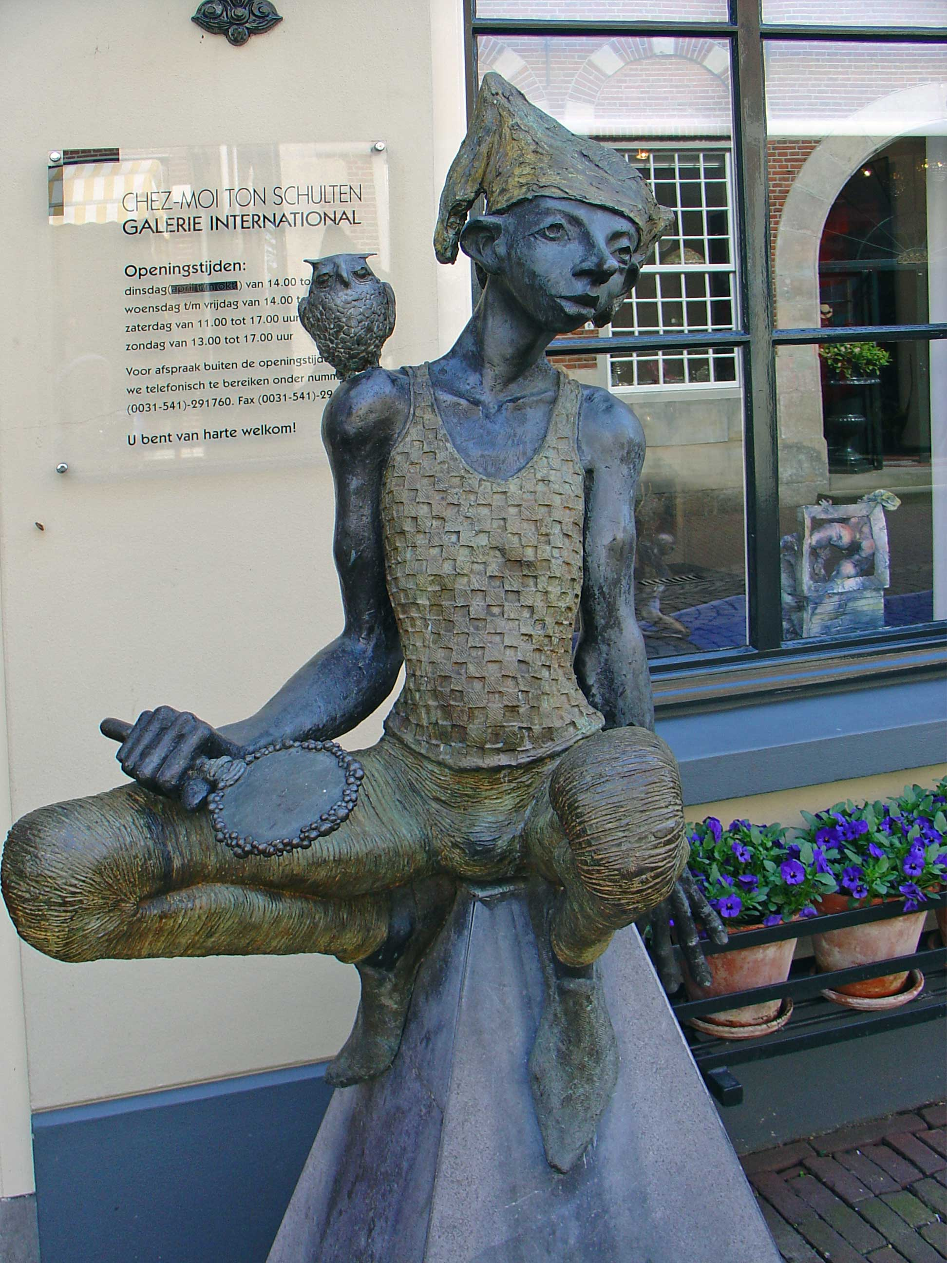 Tijl Uilenspiegel door Dirk de Keizer